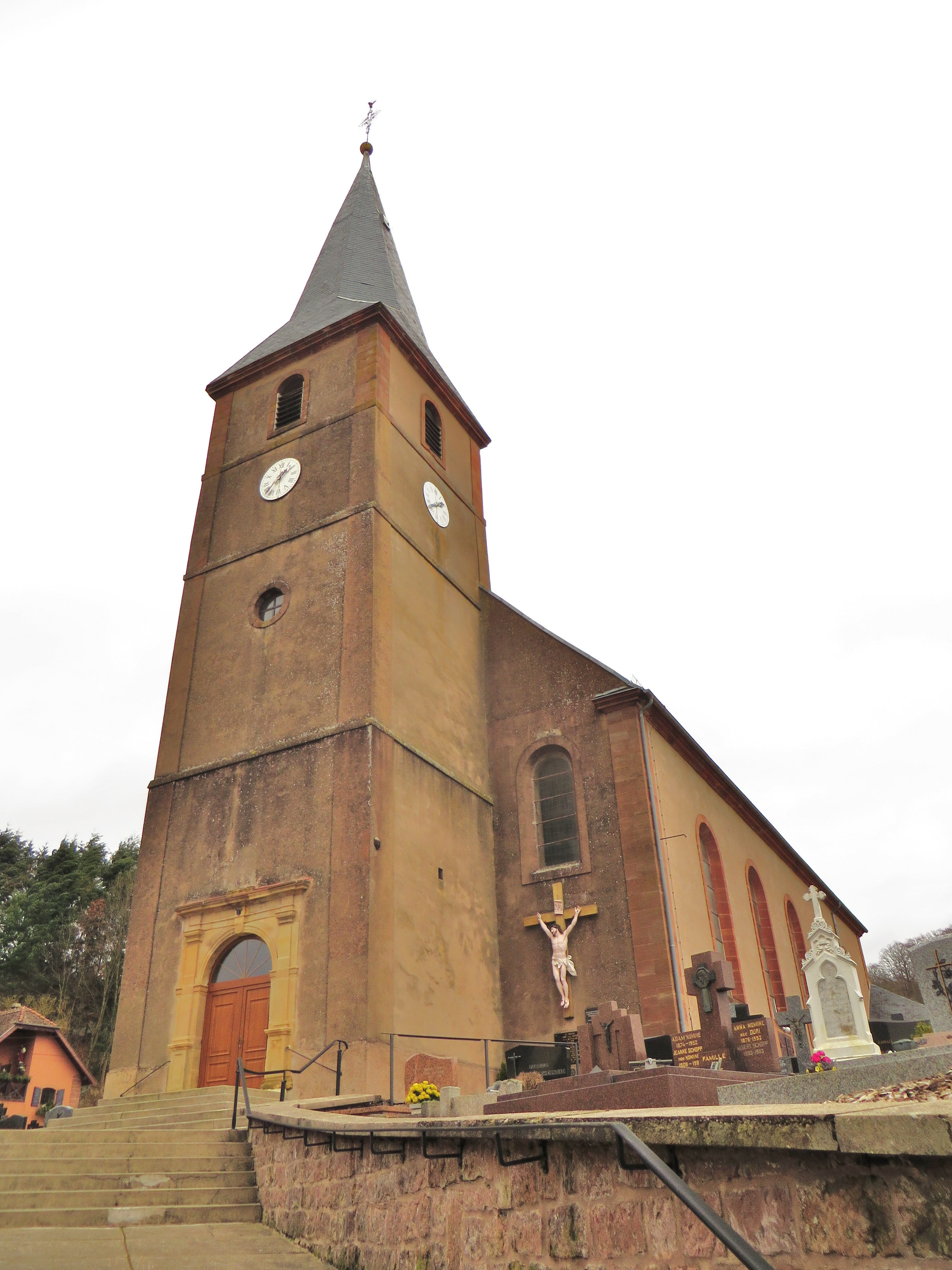 Walschbronn eglise